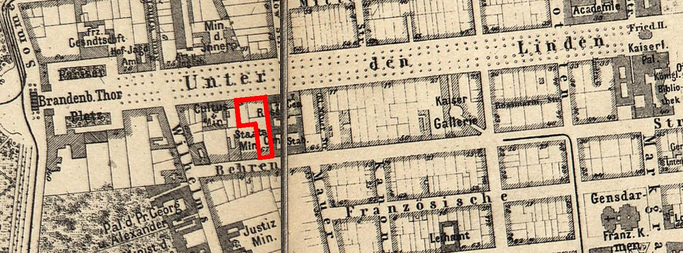 Lageplan des ehemaligen Berliner Hotels Bristol, Unter den Linden 5-6.